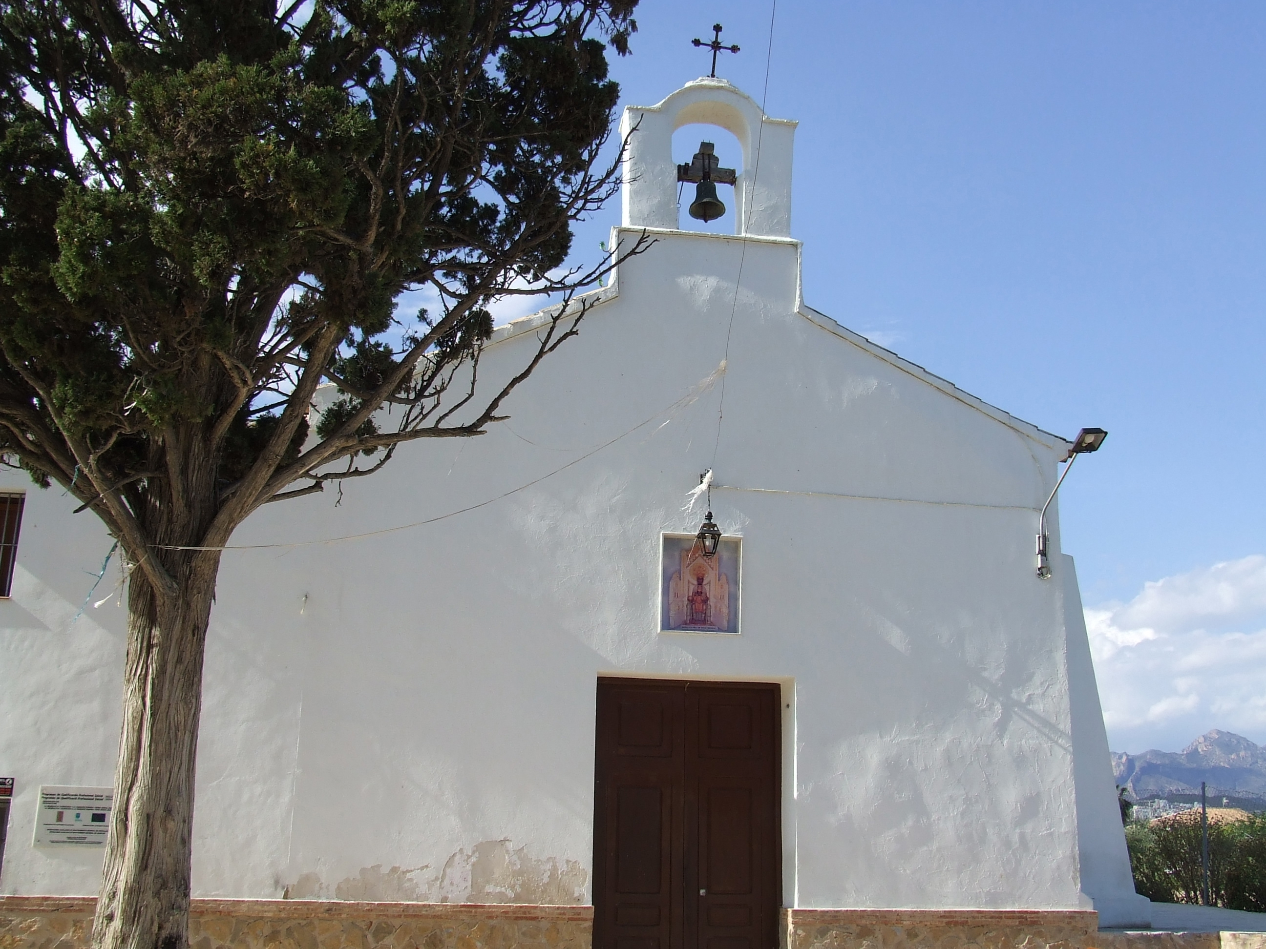 Fachada Ermita Montserrat Mutxamel